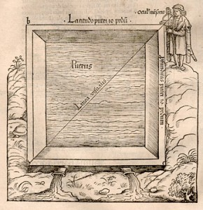 איור מתוך ספרו של יוהנס שטפלר Elucidatio fabricae ususque astrolabi, לשימוש בערך יוהנס שטפלר. חלפו מאות שנים מאז מות היוצר.